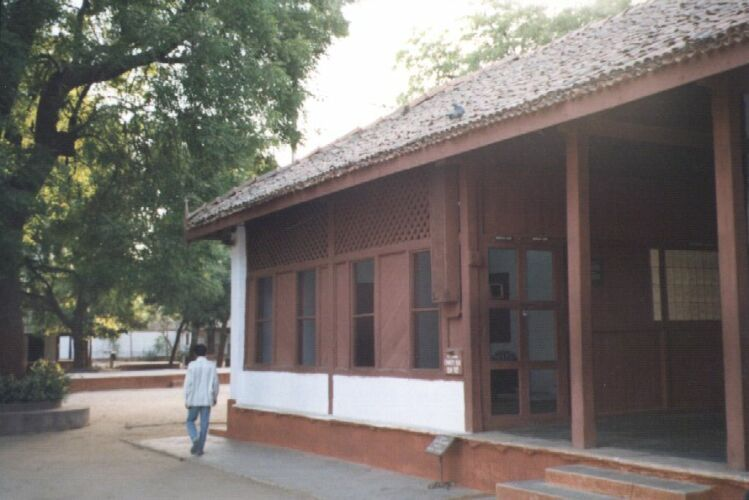 Gandhis Haus im Harijan Ashram in Ahmedabad, Indien